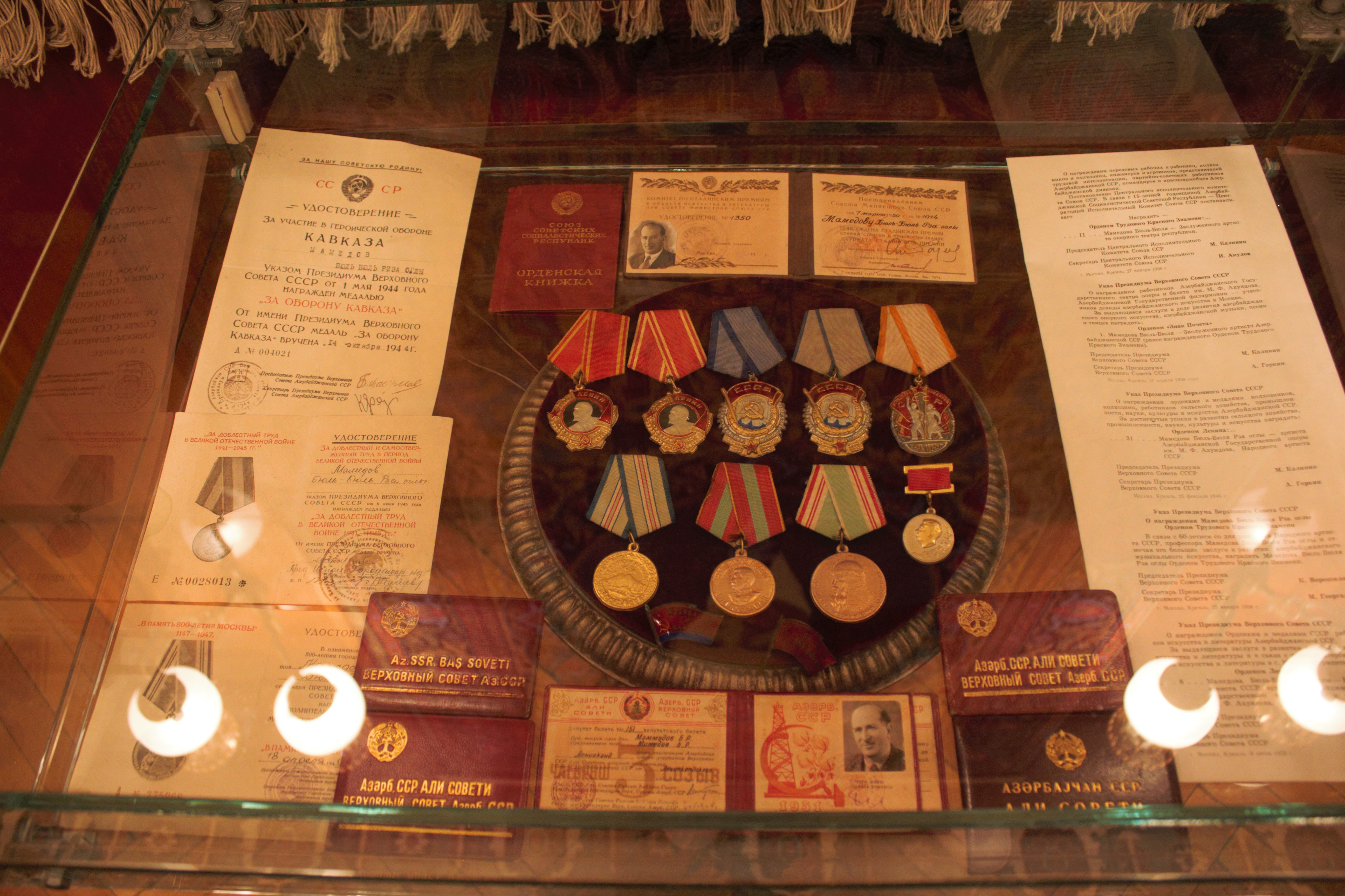 Экспонаты мемориального музея Бюльбюля. Медали, ордена и депутатская книжка Бюльбюля.